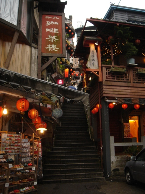 レトロ調な九份の街並み。2005年6月撮影